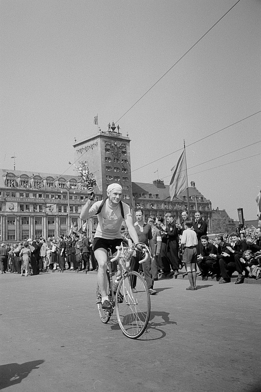 Original image description from the Deutsche Fotothek Portrait des dänischen Radrennfahrers Eluf Dalgaard auf seinem Rennrad anläßlich des 8. Etappenstarts der Friedensfahrt